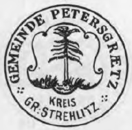 Altes Siegel des Ortes Petersgrätz im Kreis Groß Strehlitz, Schlesien.